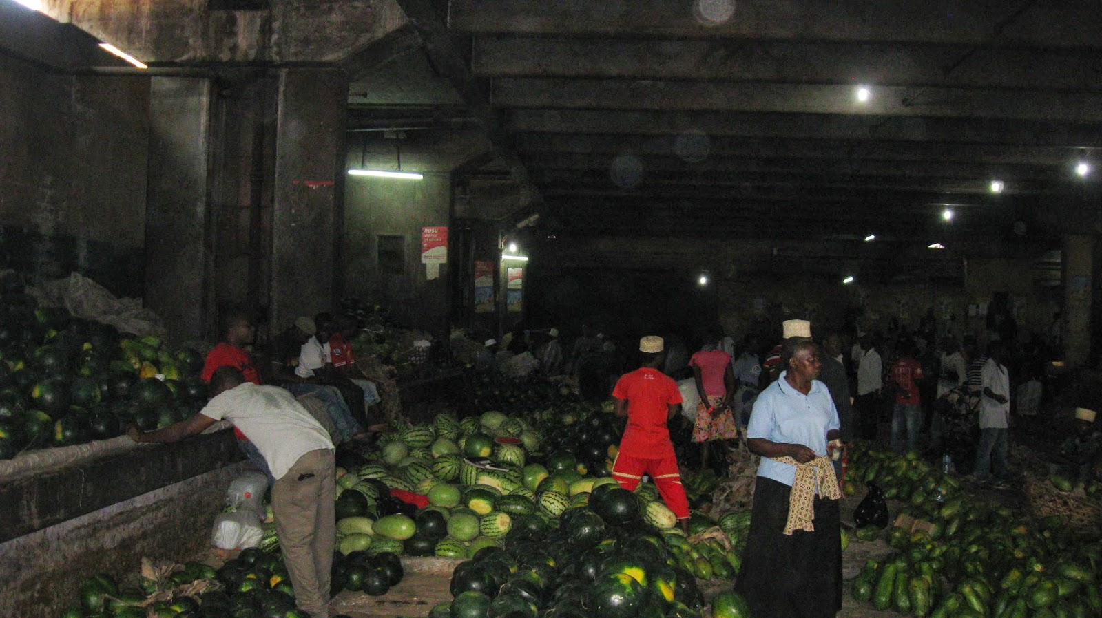 Kiswahili: Soko la Kariakoo kwa ndani.